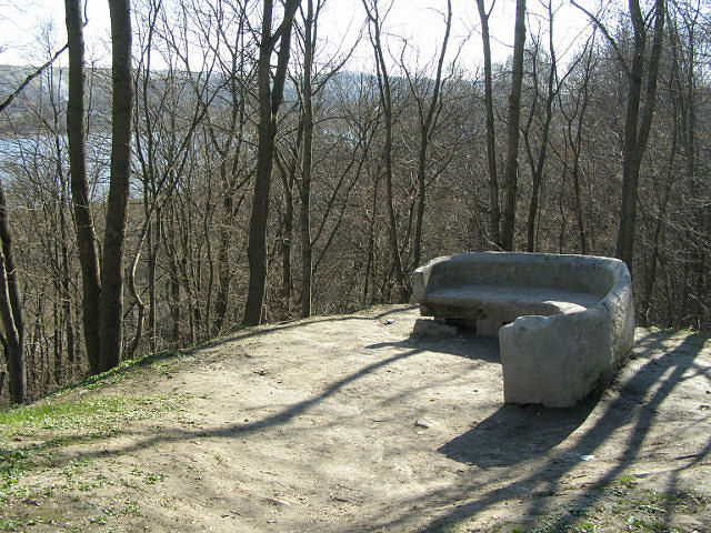 Лавочка Тараса Шевченко в Вишневце